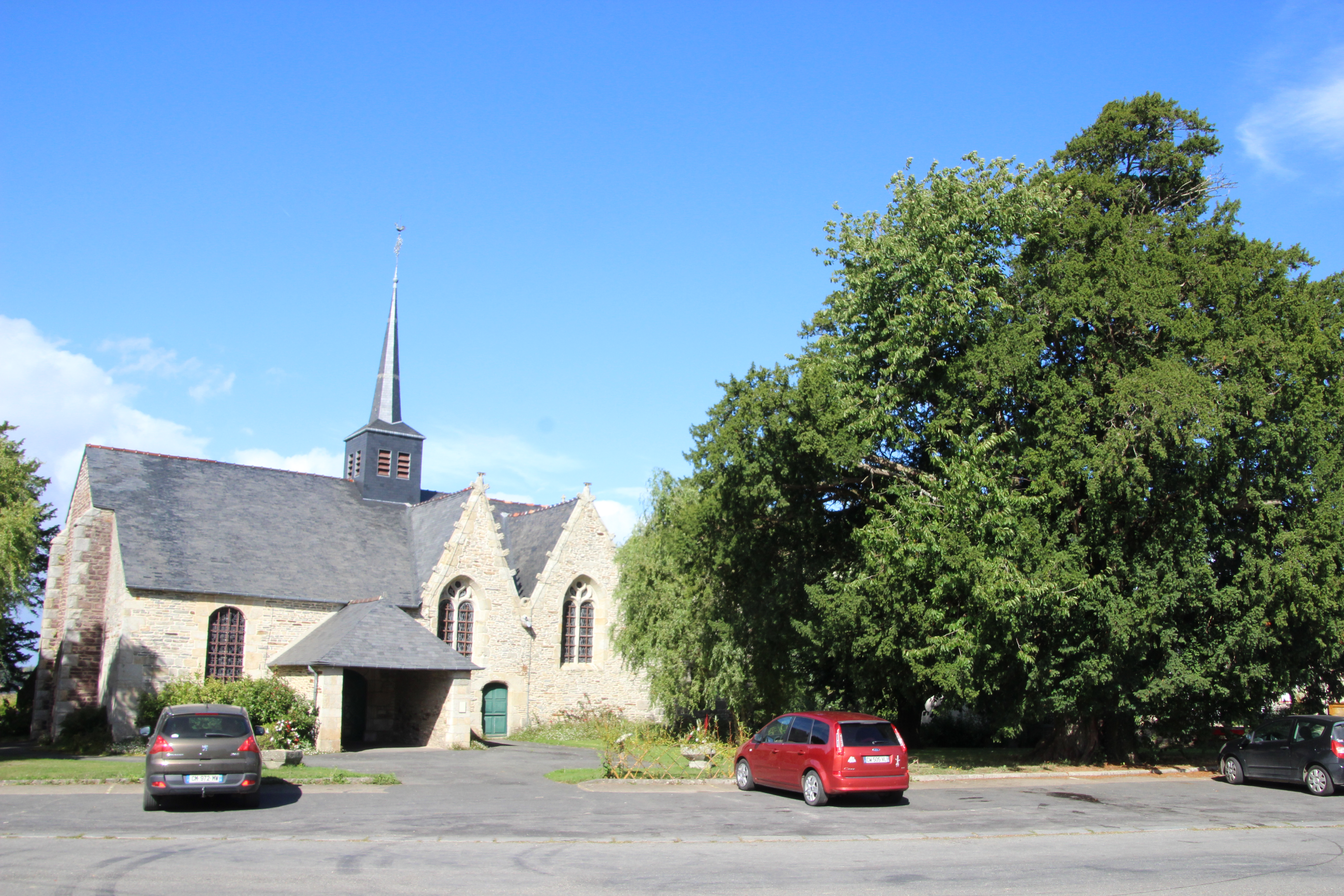 église st leonore et if à saint launeuc